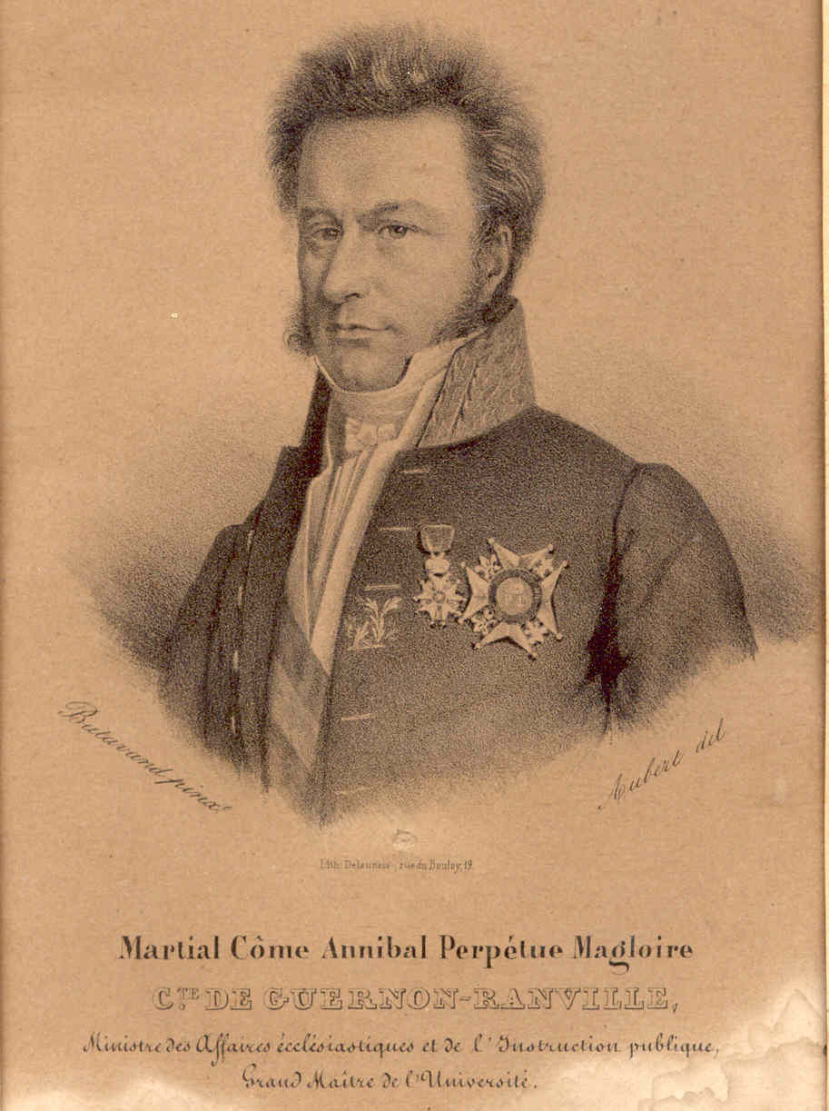 Portrait du Comte Martial de Guernon-Ranville